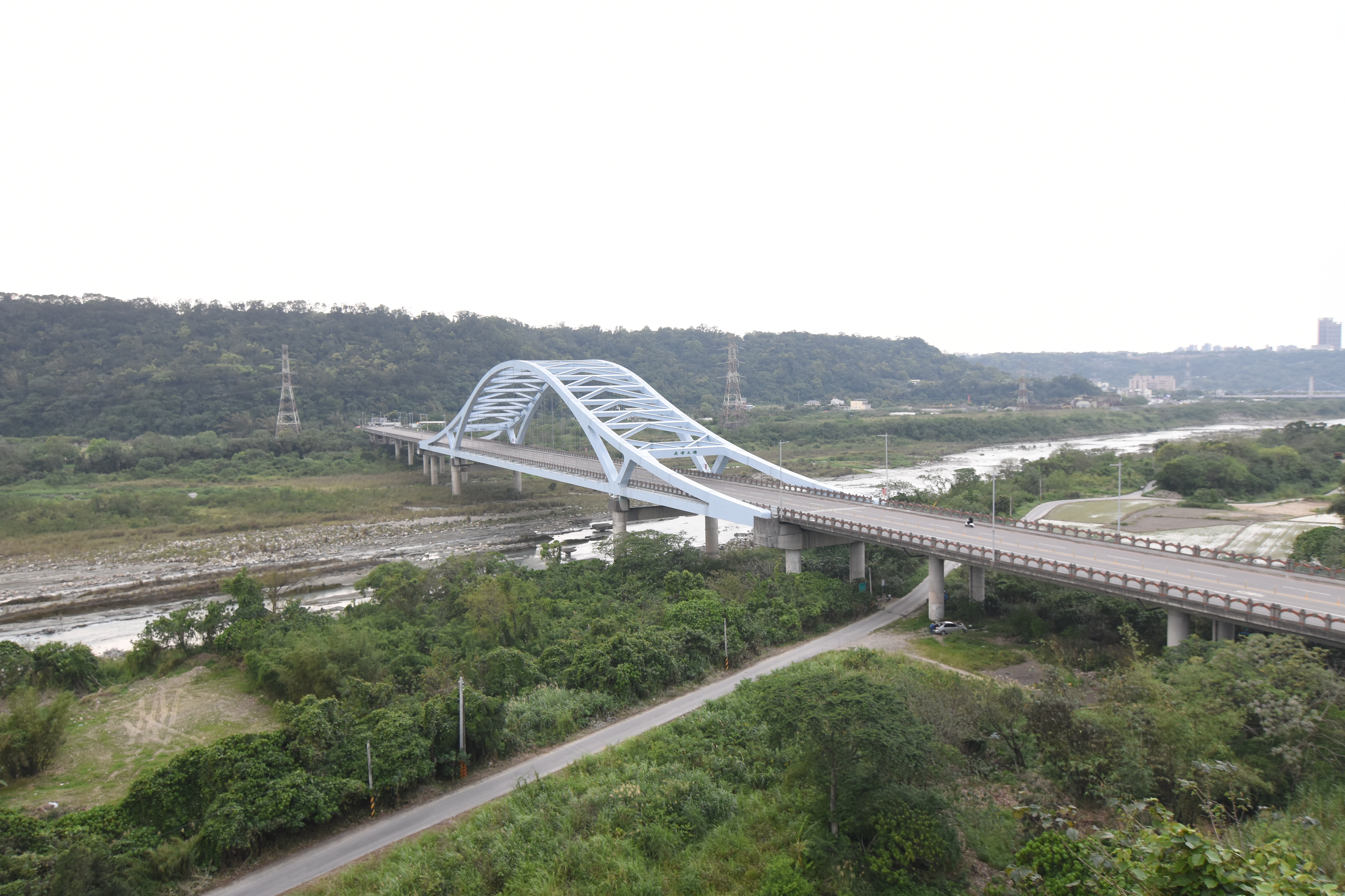 中文（台灣）: 大溪區河川4及橋樑